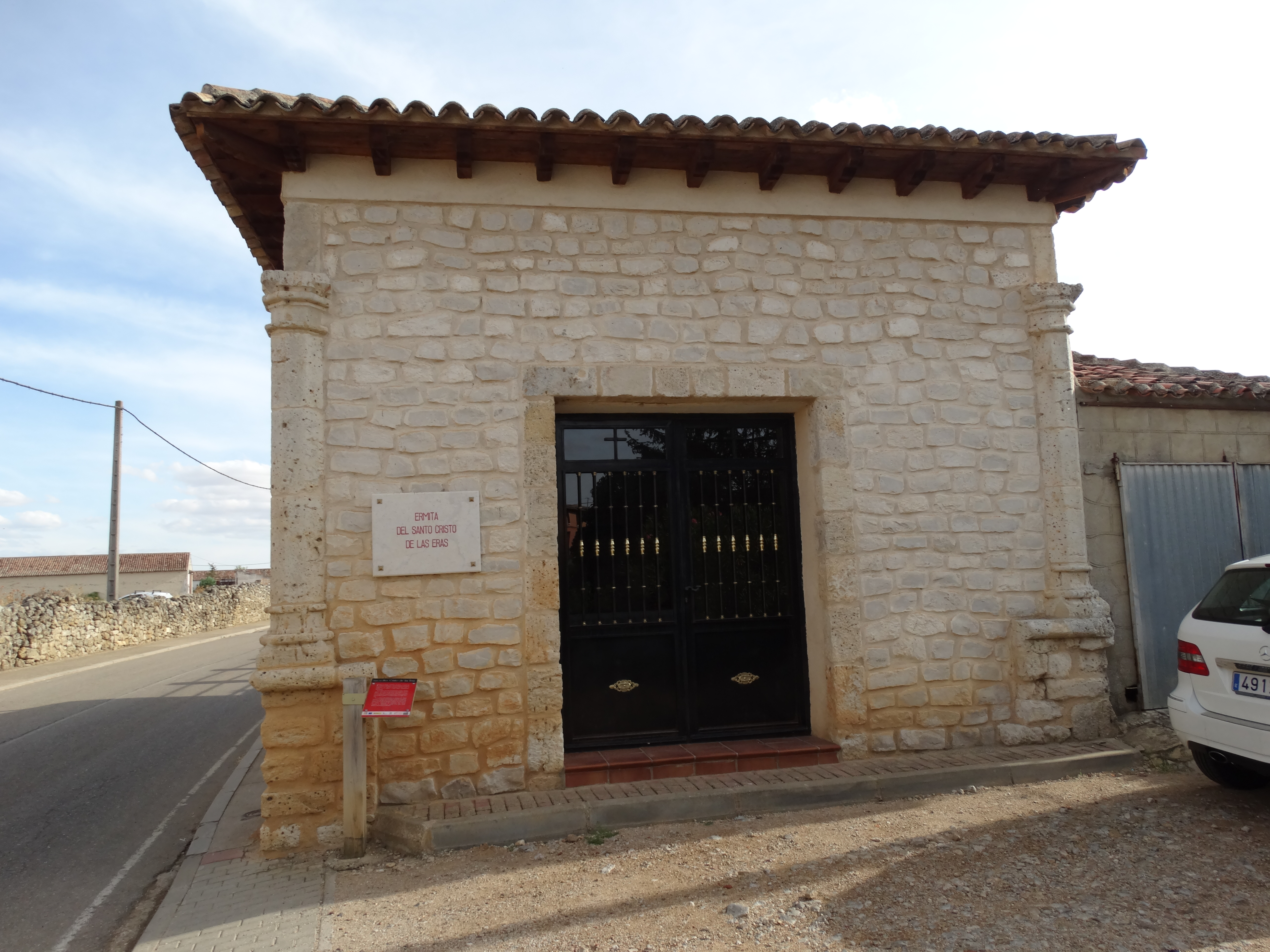 Castromonte, provincia de Valladolid, España. Humilladero llamado Ermita del Santo Cristo de las Eras. A la salida del pueblo, en el camino hacia Torrelobatón.